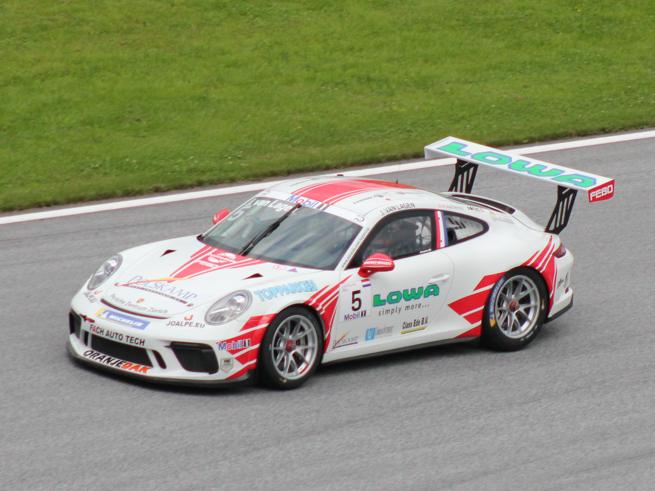 5 Jaap van Lagen beim Rennwochenende in Österreich 2018